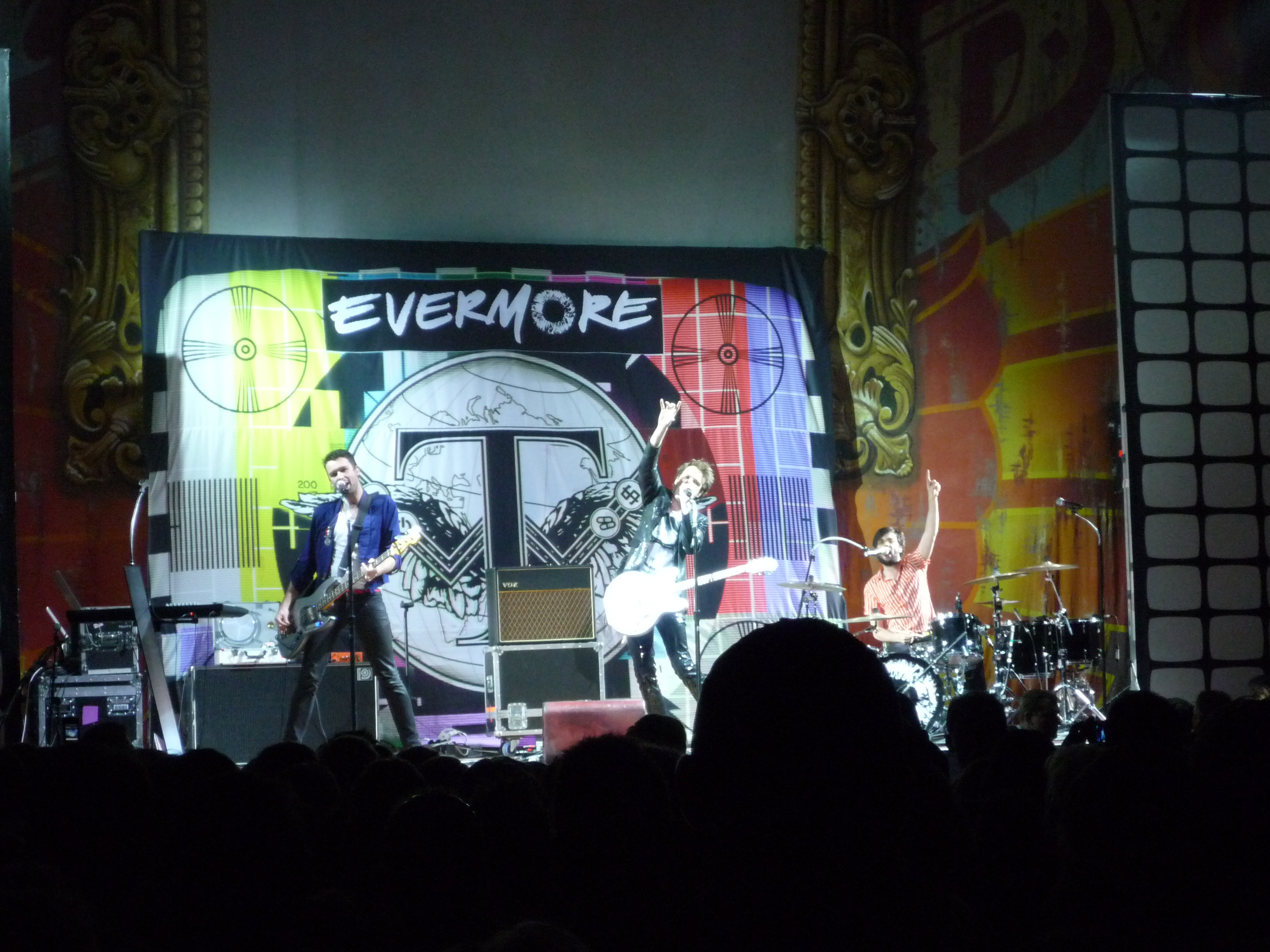 Evermore in Freiburg als Vorband für P!nk im Rahmen der Funhouse-Tour